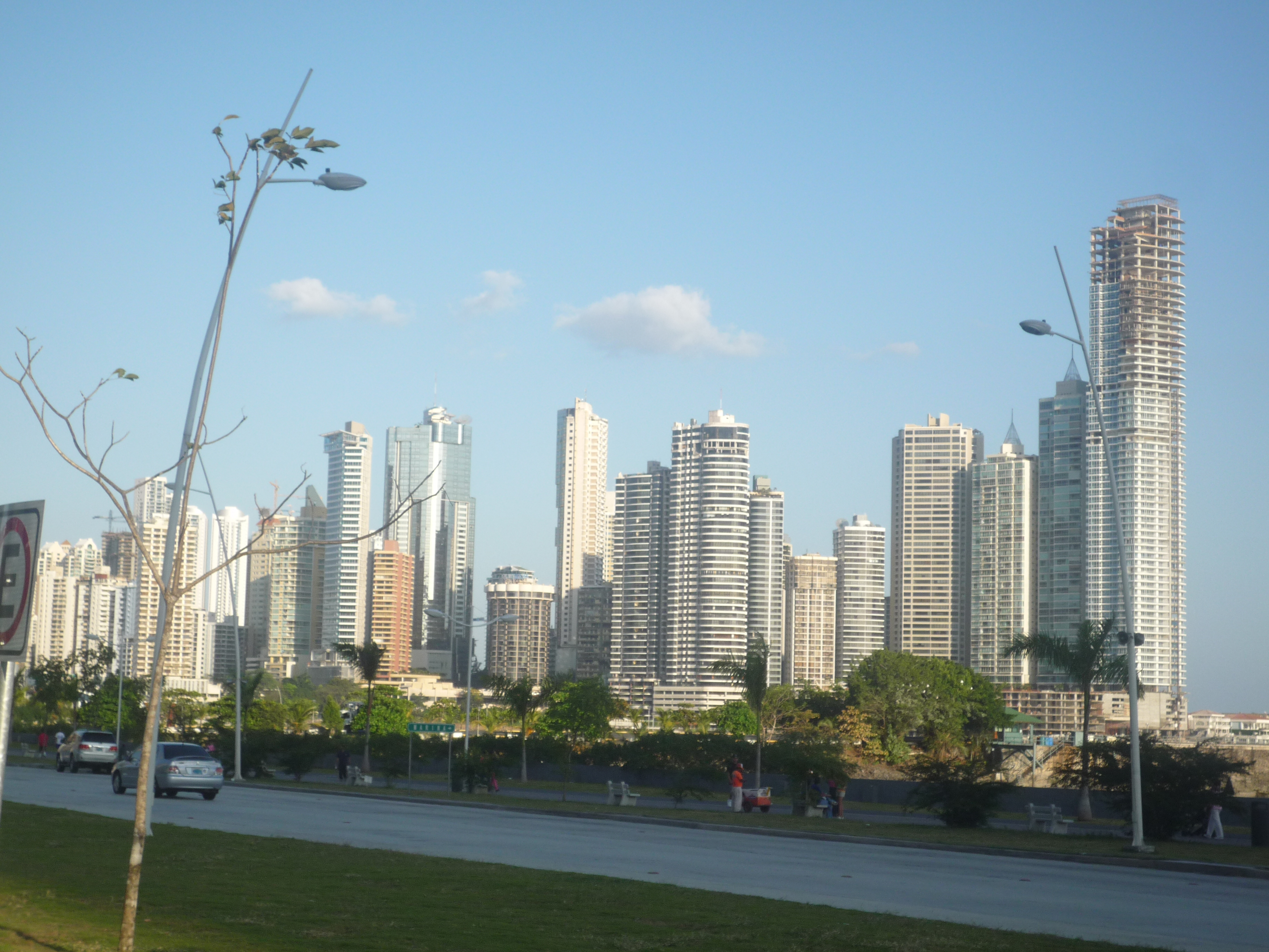 Punta Paitilla, Ciudad de Panamá, Panamá.